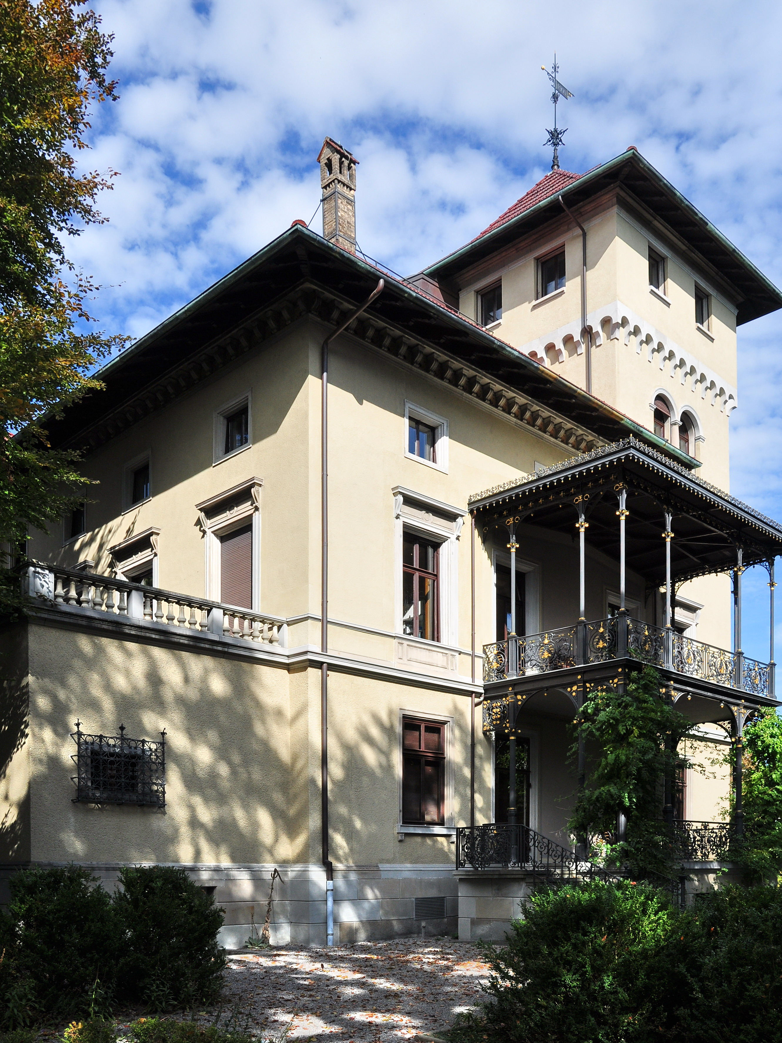 Villa Tobler, Winkelwiese in Zürich (Switzerland)